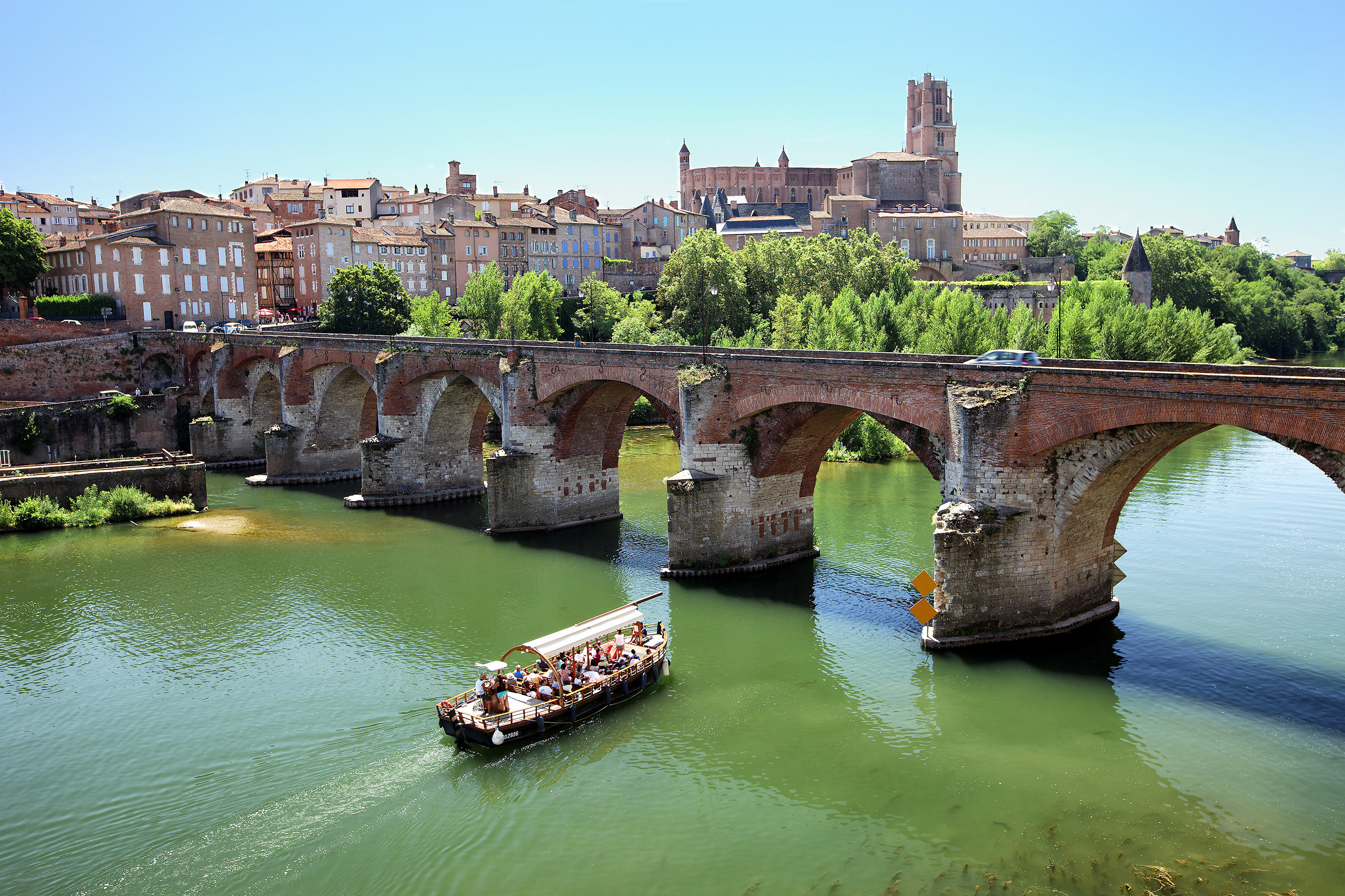 Cathédrale Sainte Cécile, Albi. Vue sur le Tarn et le Pont Vieux. It is indexed in the Base Mérimée, a database of architectural heritage maintained by the French Ministry of Culture, under the references PA00095453 and PA00095481 .